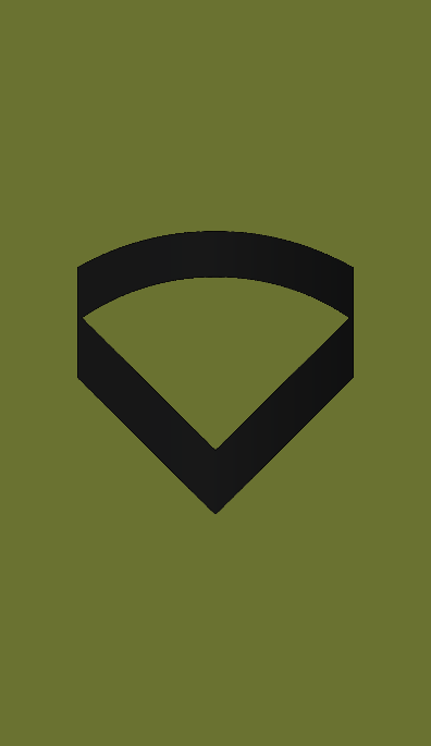 Distinksjoner Seniorvisekorporal